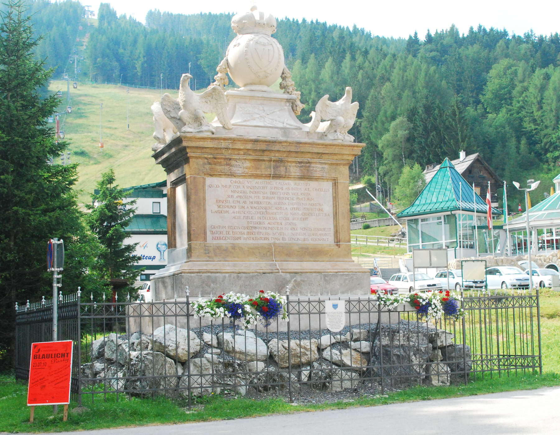 Carolus-Denkmal, anlässlich der Errichtung der Semmeringstraße